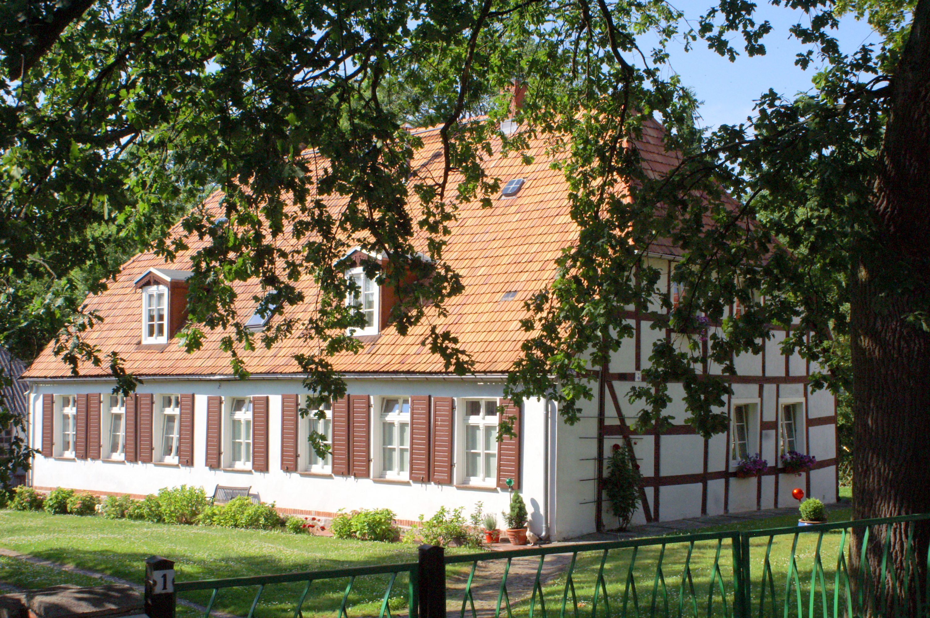 Gützkow, Teichstrasse 1, Schulzenhof